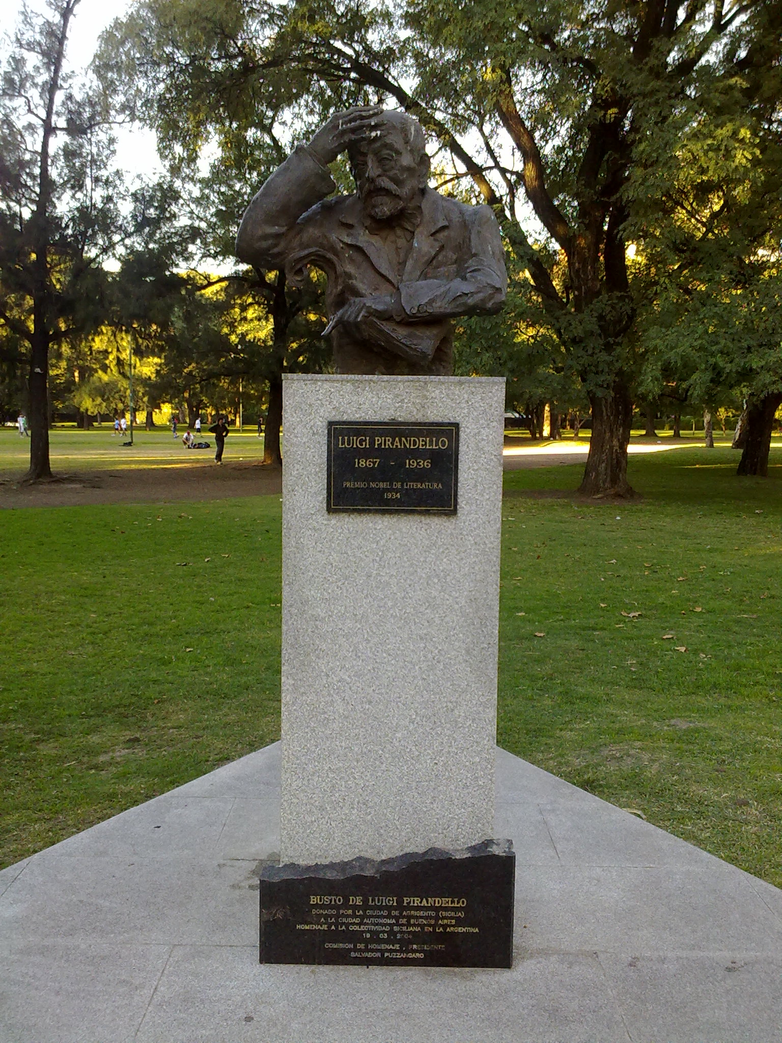 Busto de Luigi Pirandello. La obra es del escultor siciliano Giuseppe “Pino” Cirami. Al pie puede leerse la placa: Donado por la ciudad de Agrigento (Sicilia) a la Ciudad Autónoma de Buenos Aires. Homenaje a la colectividad siciliana en la Argentina. 19/03/2004. Comisión de Homenaje, Presidente Salvador Puzzangaro.